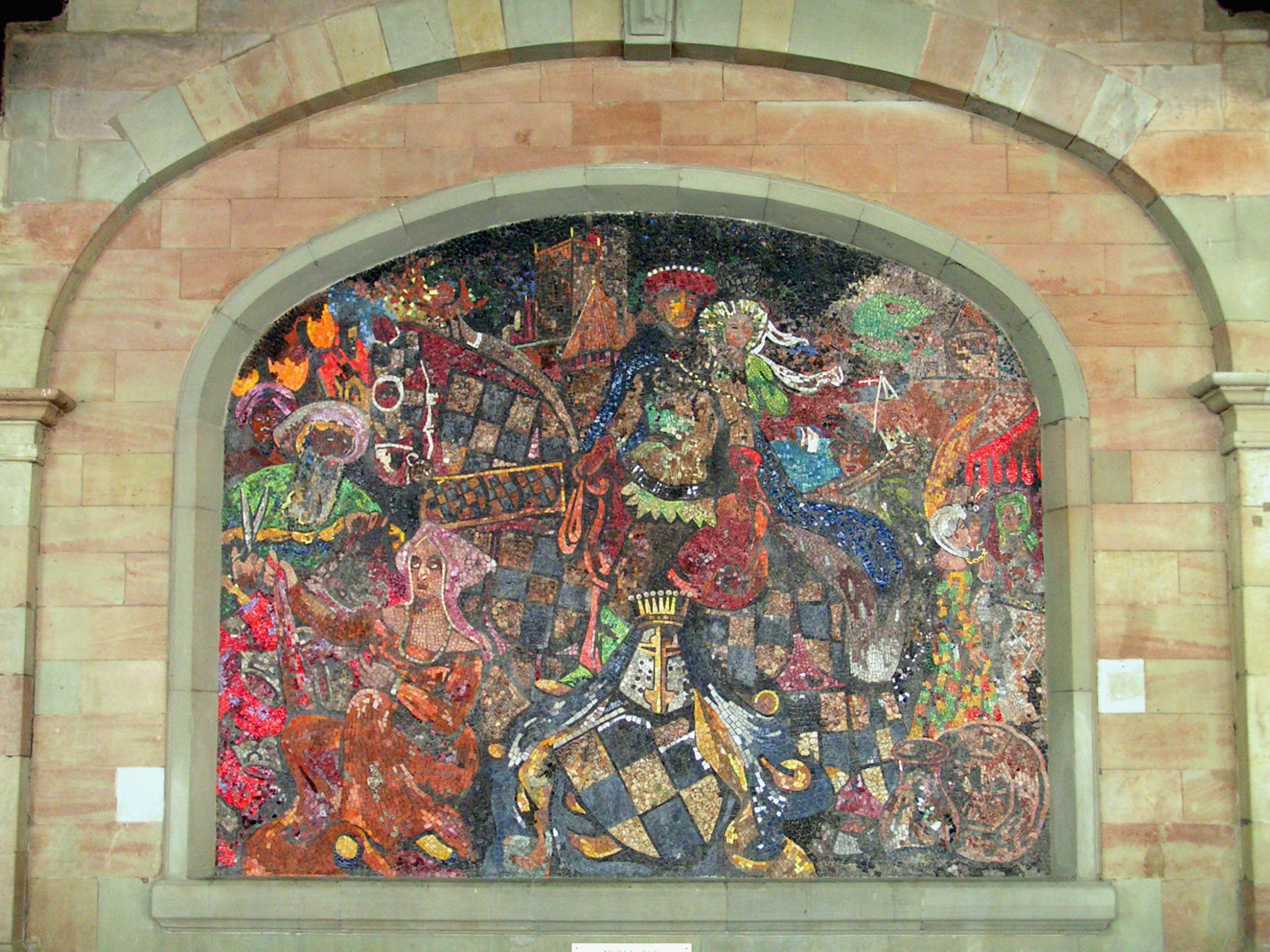 Rue de l’Hôtel-de-Ville 1, Genève. Ancien arsenal..